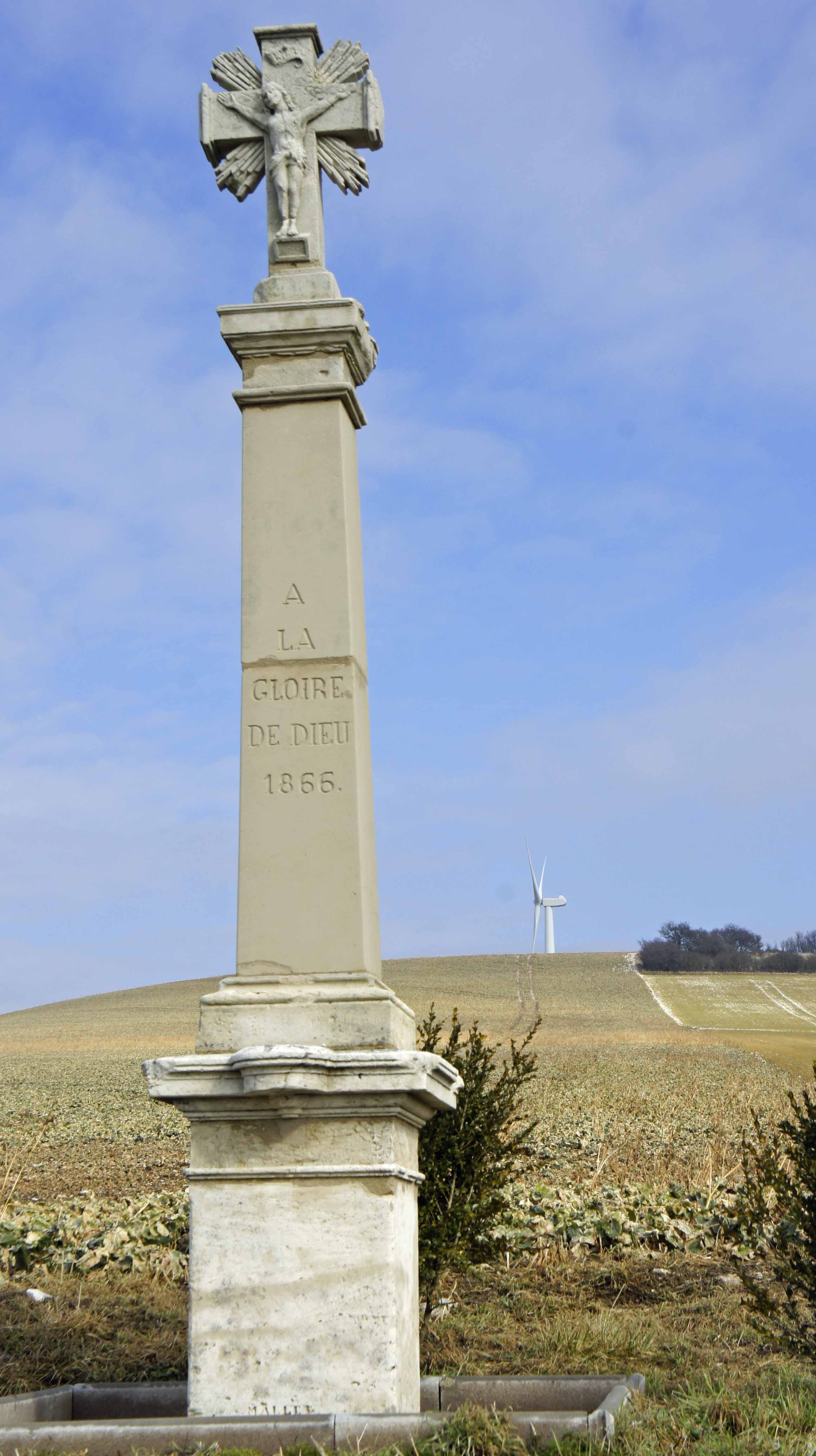 Croix et au second plan un moulin à vent à Courcelles sur Aire.